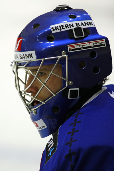 Fabrice Lhenry, Tournoi du Mont-Blanc 2007